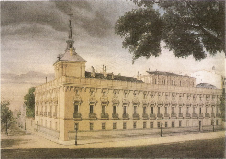 Acuarela que representa el desaparecido palacio del marqués de Alcañices en Madrid